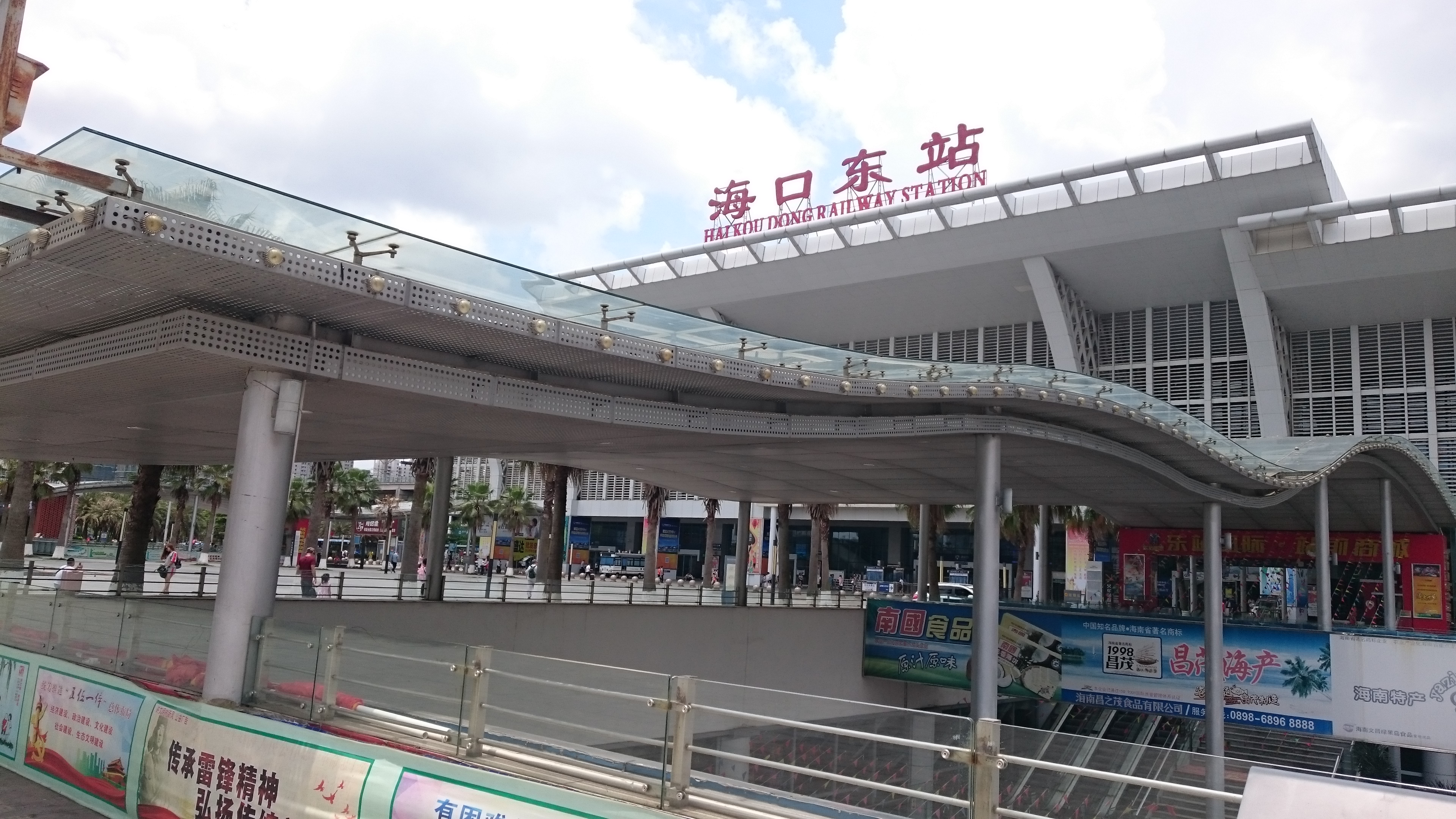 海南東環鉄道海口東駅駅舎。